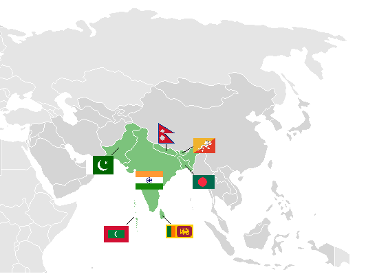 Mitgliedsstaaten der SAFF mit Flaggen